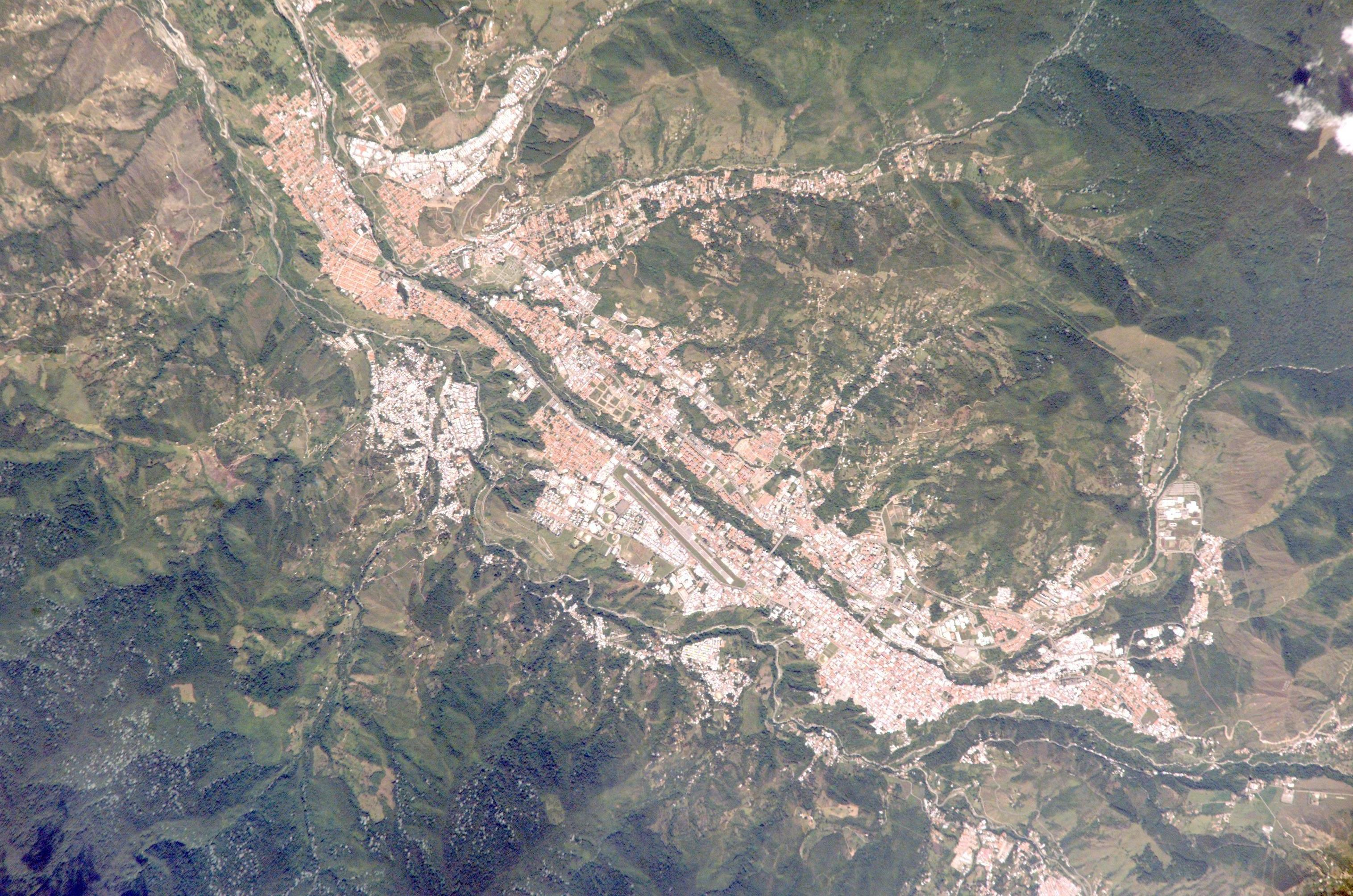 Vista aérea de la ciudad de Mérida en Venezuela, tomada desde una perspectiva noroeste-sureste.